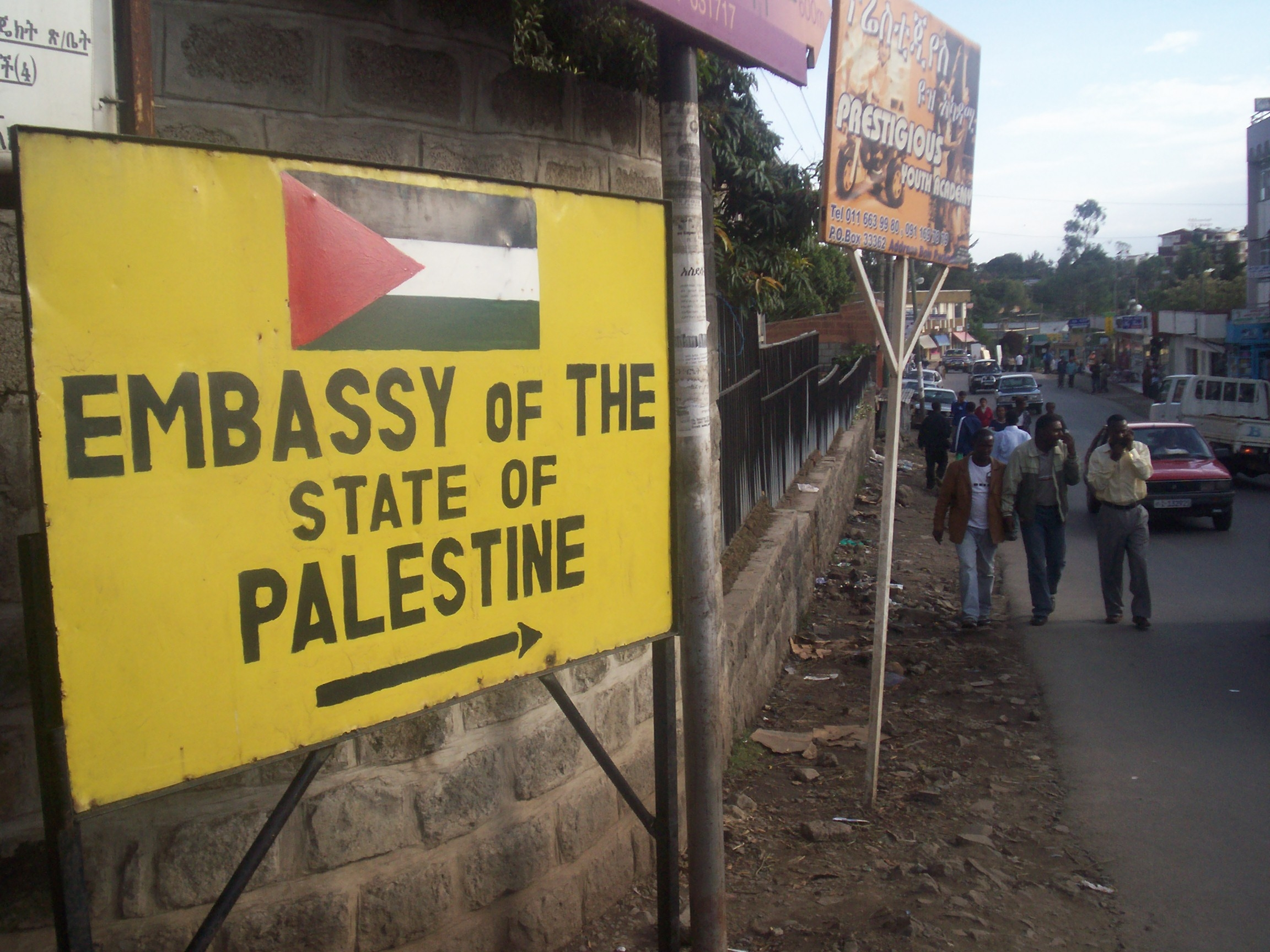 Addis Ababa, Ethiopia